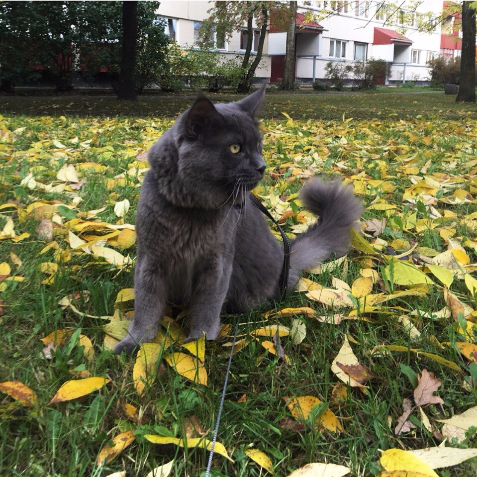 Terve kass